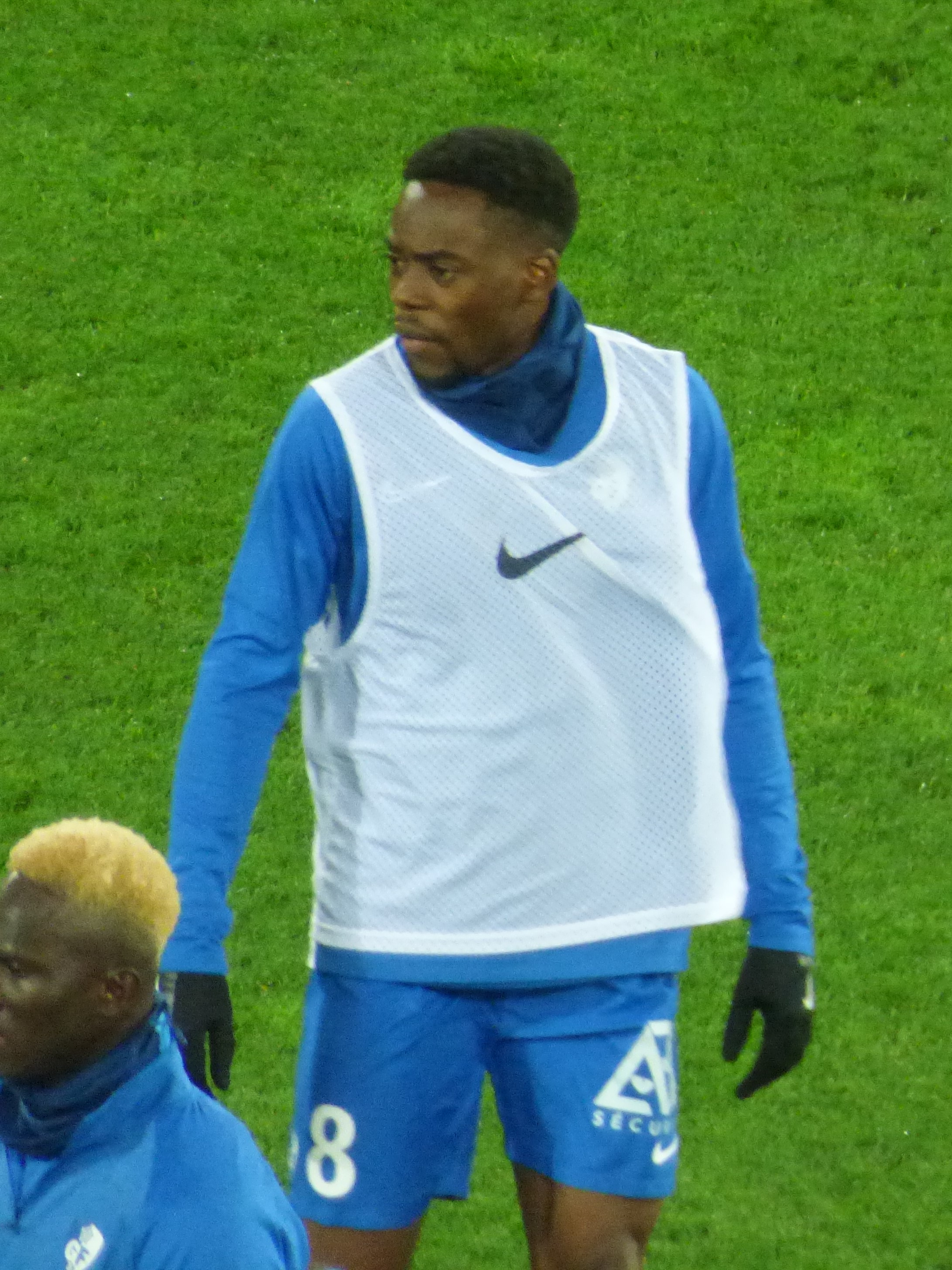 Jonathan Tinhan lors du match RC Lens / Grenoble Foot 38, le 10 février 2020, comptant pour la vingt-quatrième journée du championnat de France de football de Ligue 2 2019-2020, au Stade Bollaert-Delelis.